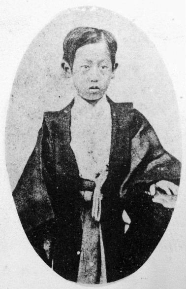 a Japanese man 徳川家達 (Iesato Tokugawa)